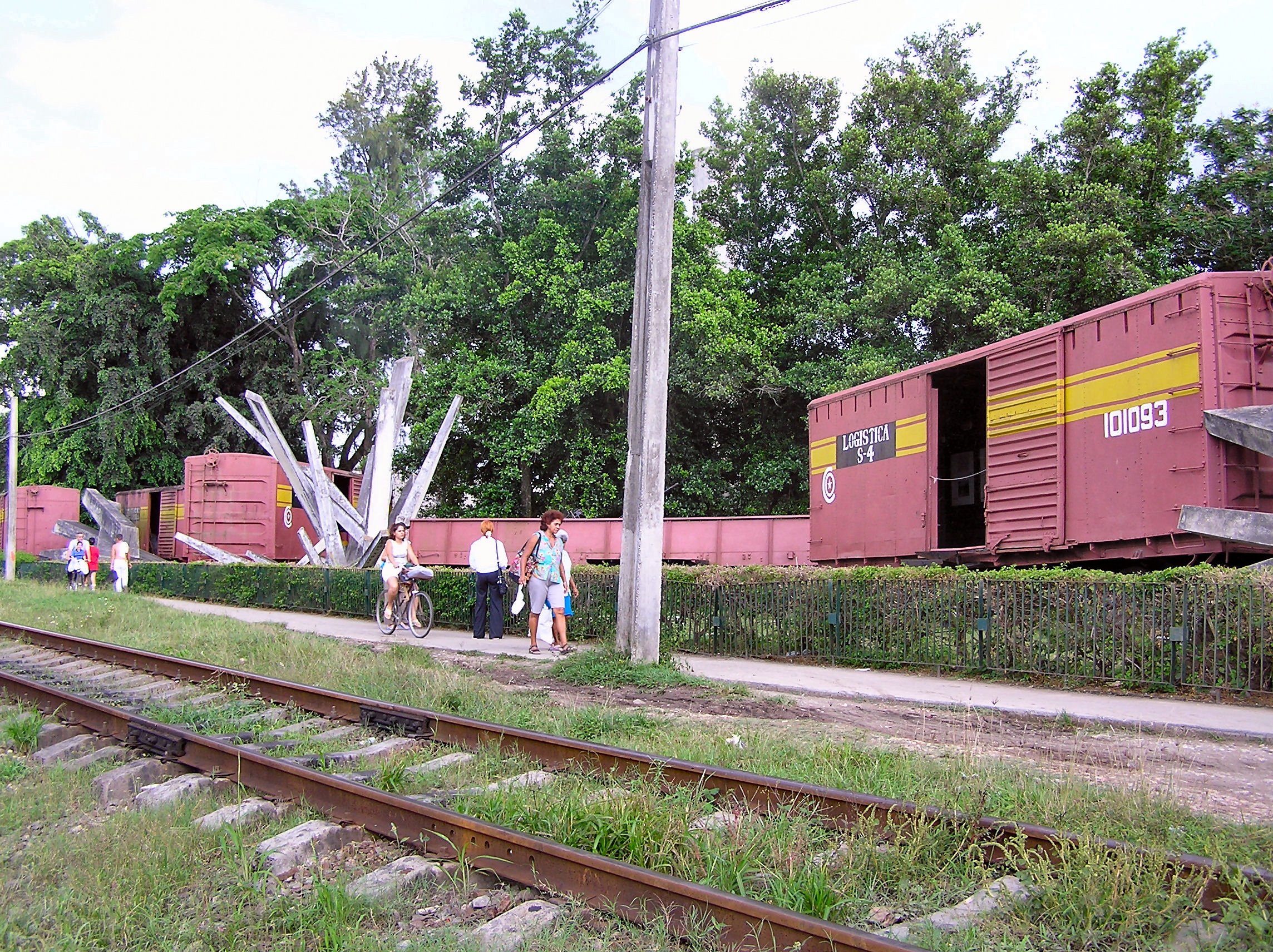 Monument commémoratif de la bataille de Santa Clara (29 décembre 1958) - Cuba